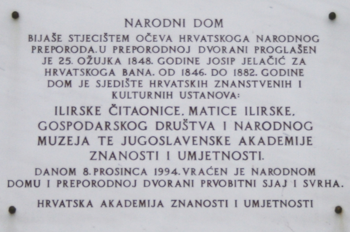 spomen ploča na "Narodnom domu", Opatička 18, Zagreb, Hrvatska